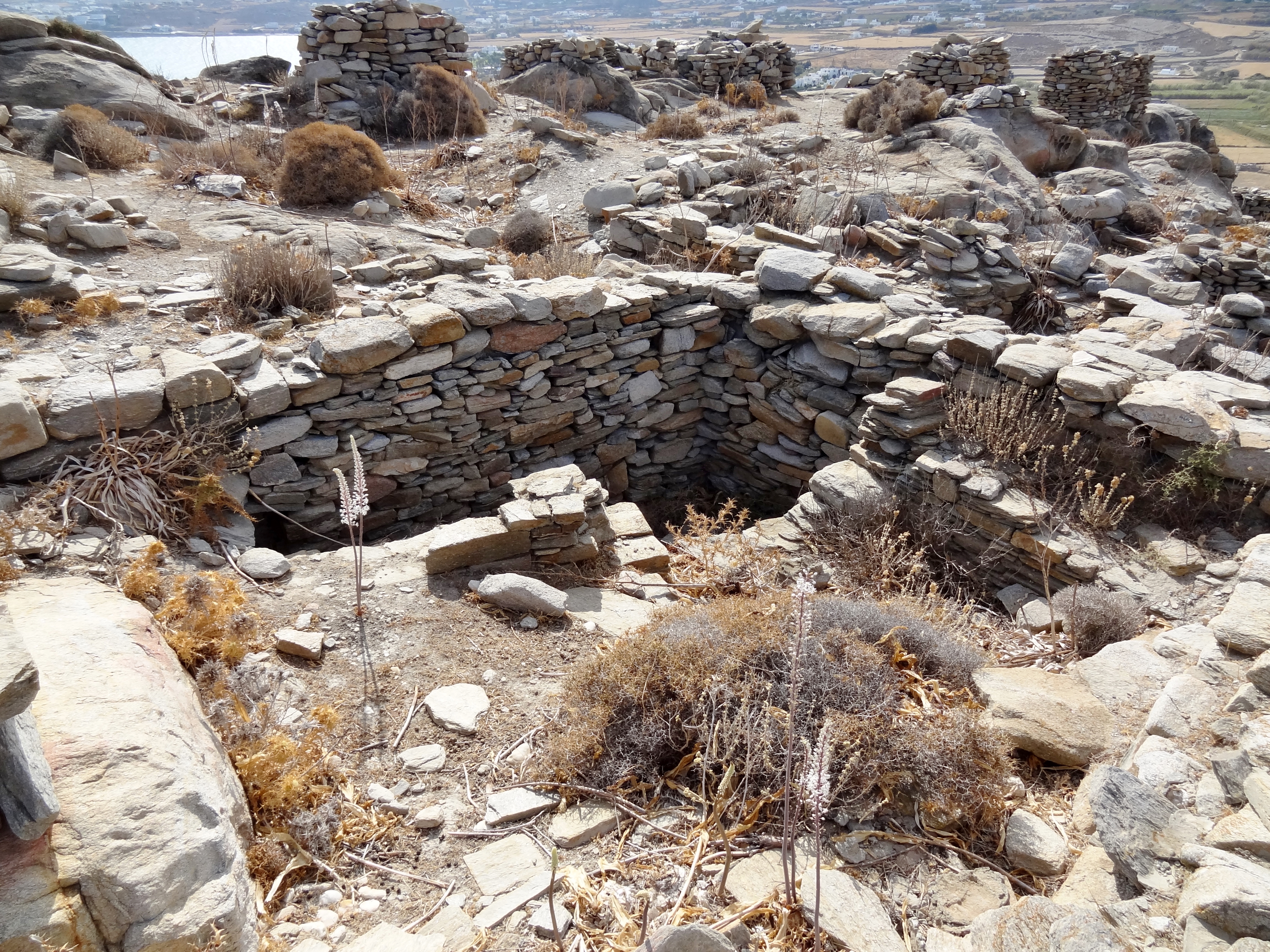 Mykenischen Akropolis von Koukounaries bei Naousa auf Paros, Kykladen, Griechenland